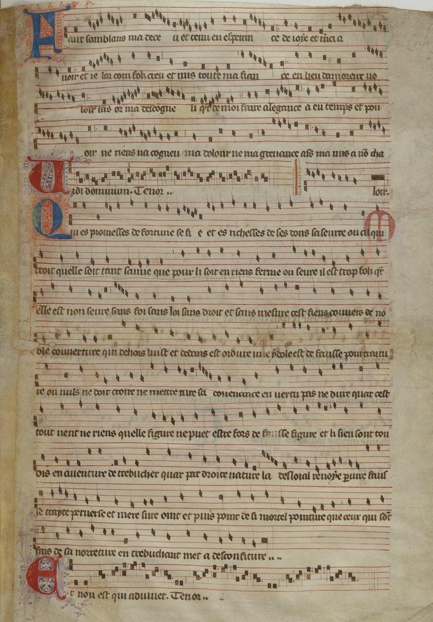 Paris, Bibliothèque Nationale, fonds français 23190